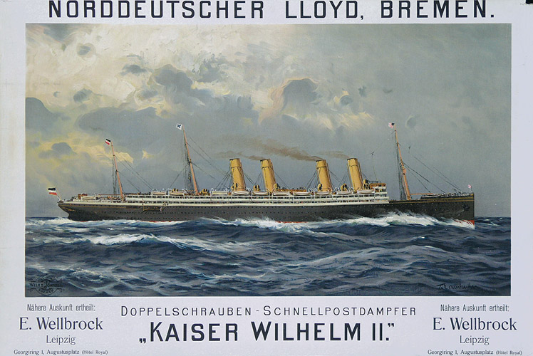 Eckenbrecher, Themistokles von (1842-1921): Norddeutscher LLoyd - Kaiser Wilhelm II.